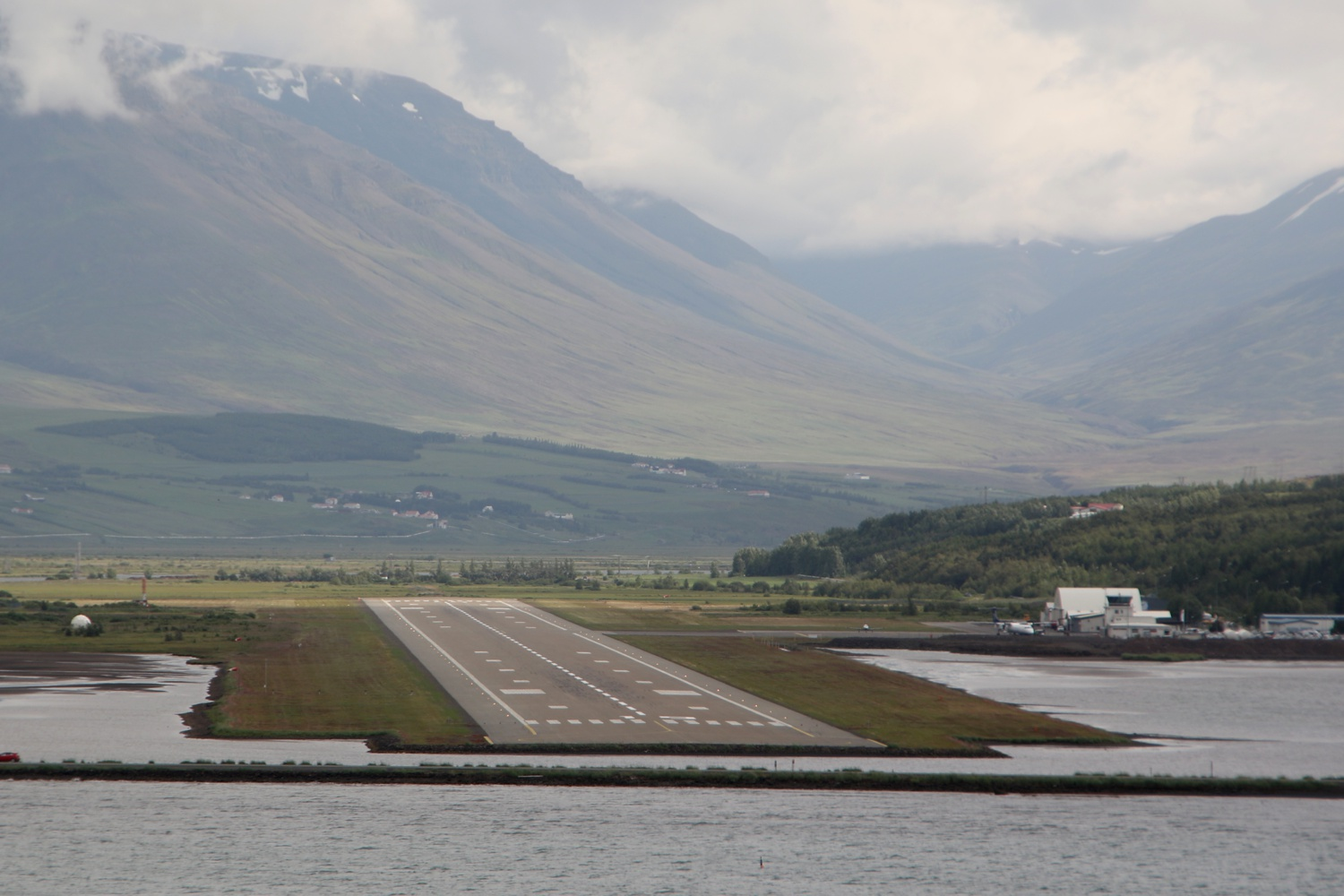 In den Fjord hinaus laufende Start- und Landebahn des Flughafens von Akureyri